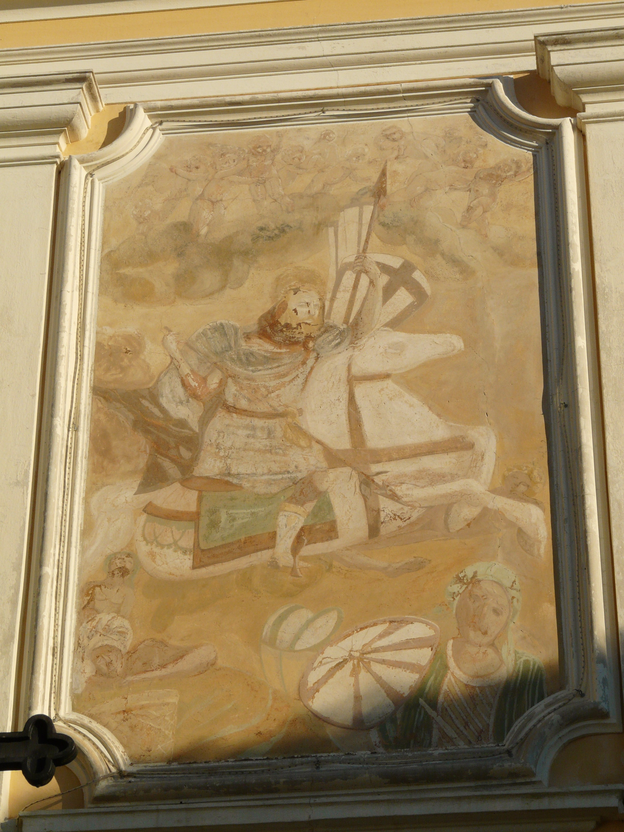 Affresco sulla facciata dell'oratorio di San Giacomo, Levanto, Liguria, Italia